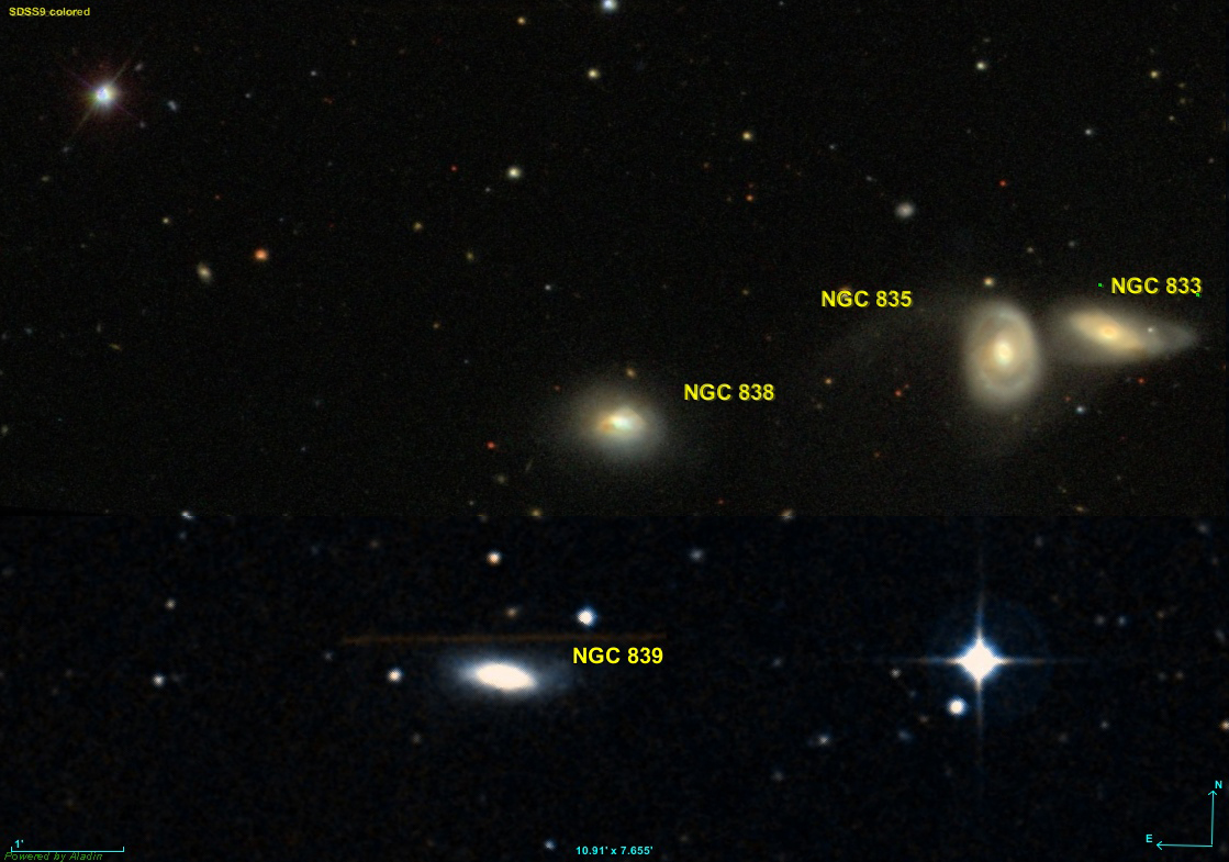 Image créée à l'aide du logiciel Aladin Sky Atlas du Centre de Données astronomiques de Strasbourg et des données fusionnées de DSS (Digitized Sky Survey) et de SDSS (Sloan Digital Sky Survey)